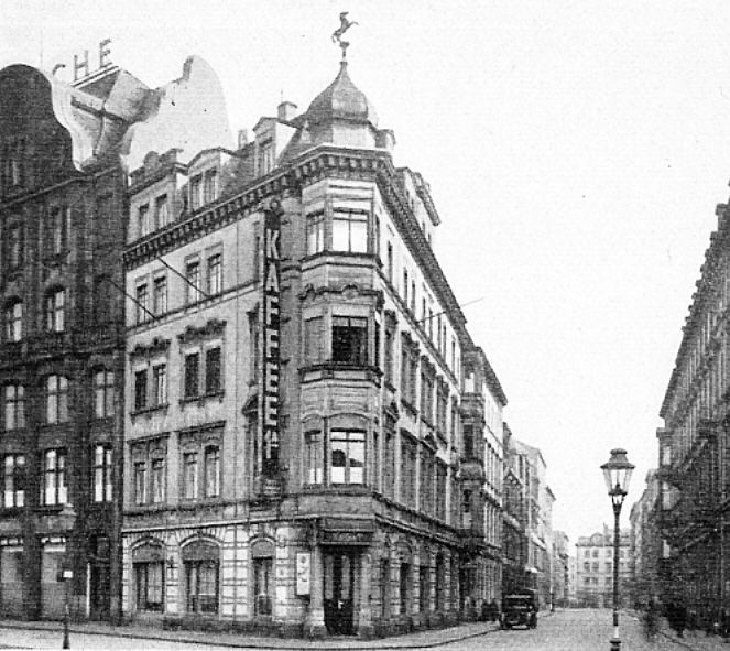 Hotel Hentschel in Leipzig, Roßstraße 1-3, Sterbeort von Max Reger, im Zweiten Weltkrieg zerstört